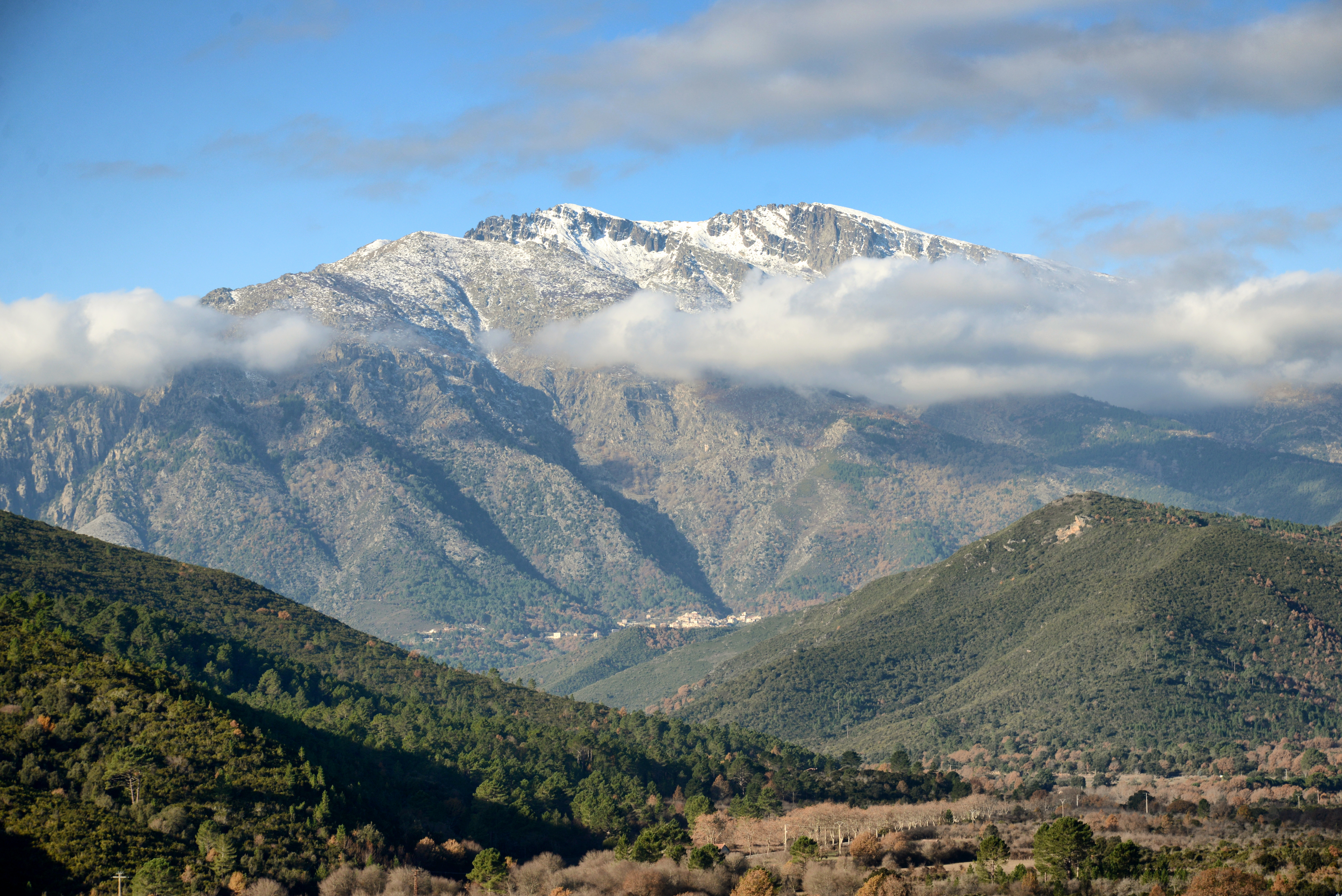 Venaco, Centre (Corse) - Vue du village dominé par le Monte Cardo (2453 m), depuis Altiani.